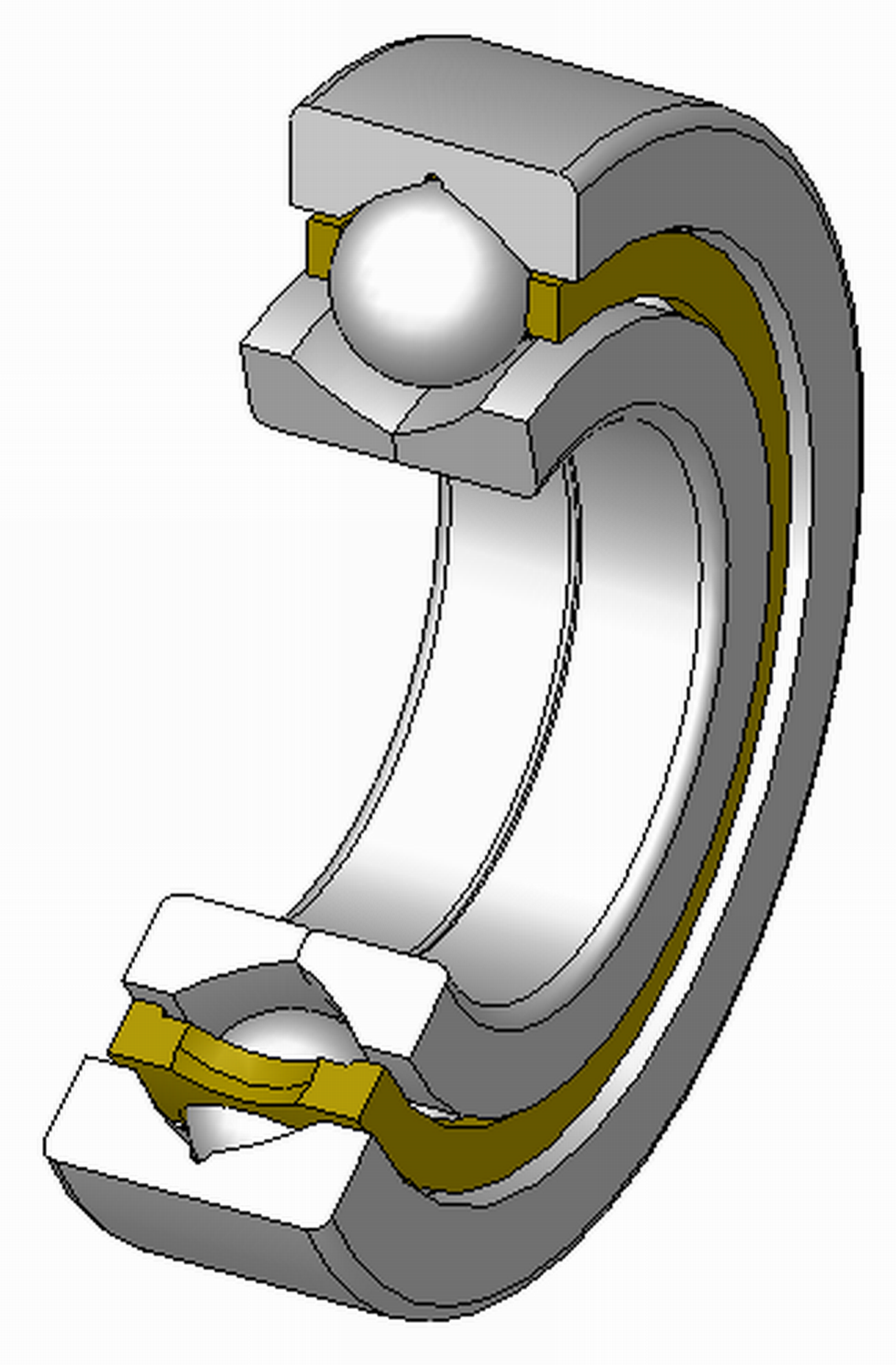 Vierpunktlager, geteilter Innenring, zerlegbar, Massivkäfig aus Messing, 120°Schnitt, Hinweis: Innenaufbau des Lagers (insbesondere des Kaefigs) variiert je nach Hersteller und Baugroesse rolling contact bearings